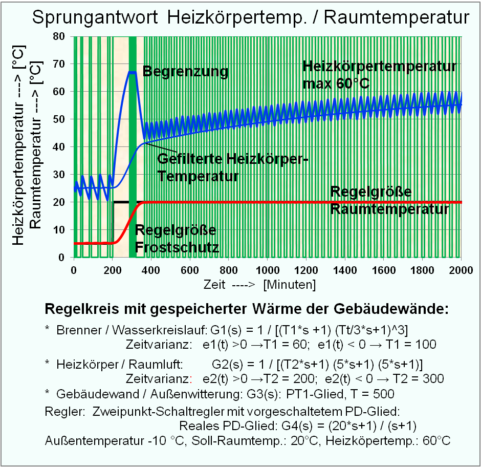 Grafische Darstellung des Verlaufes der Heizkörper- und Raumtemperatur mit Energiespeicherung der Gebäudewände.